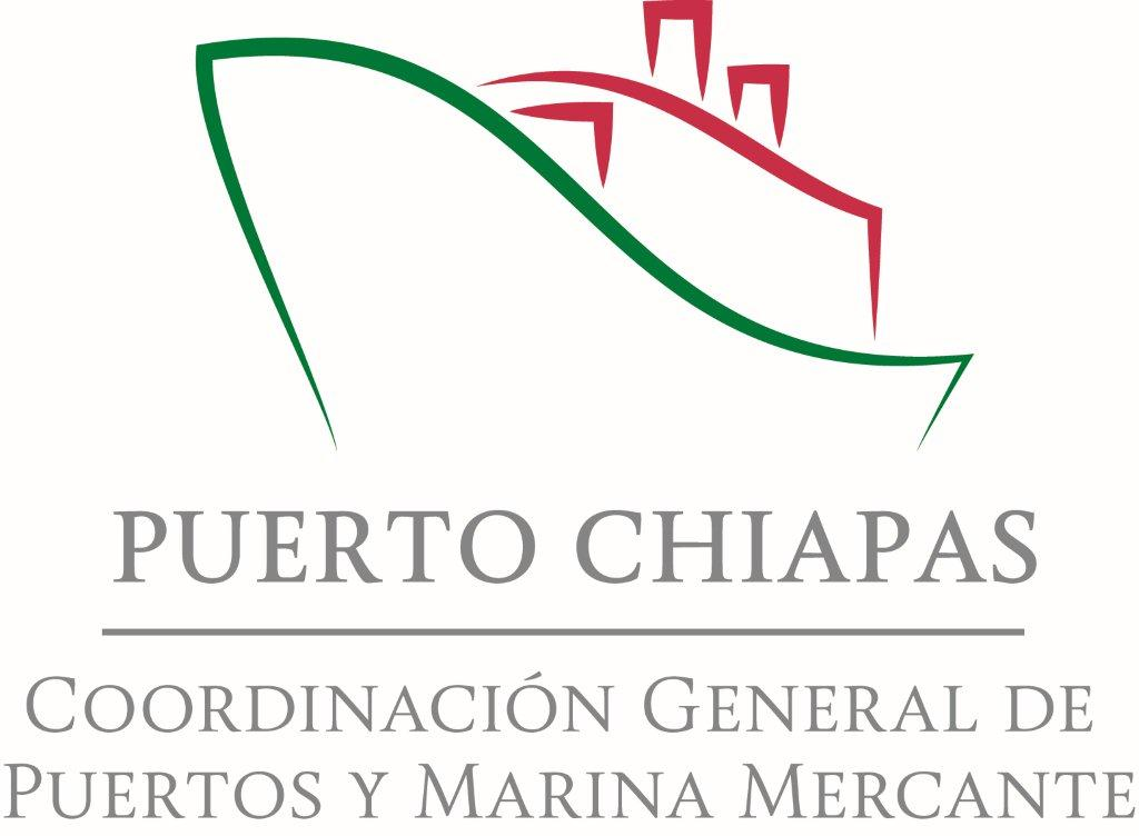 API Puerto Chiapas